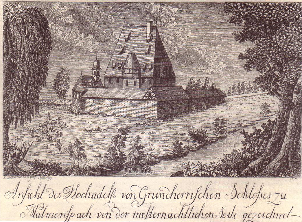 Scan eines Kupferstiches vom Schloss Malmsbach von 1798